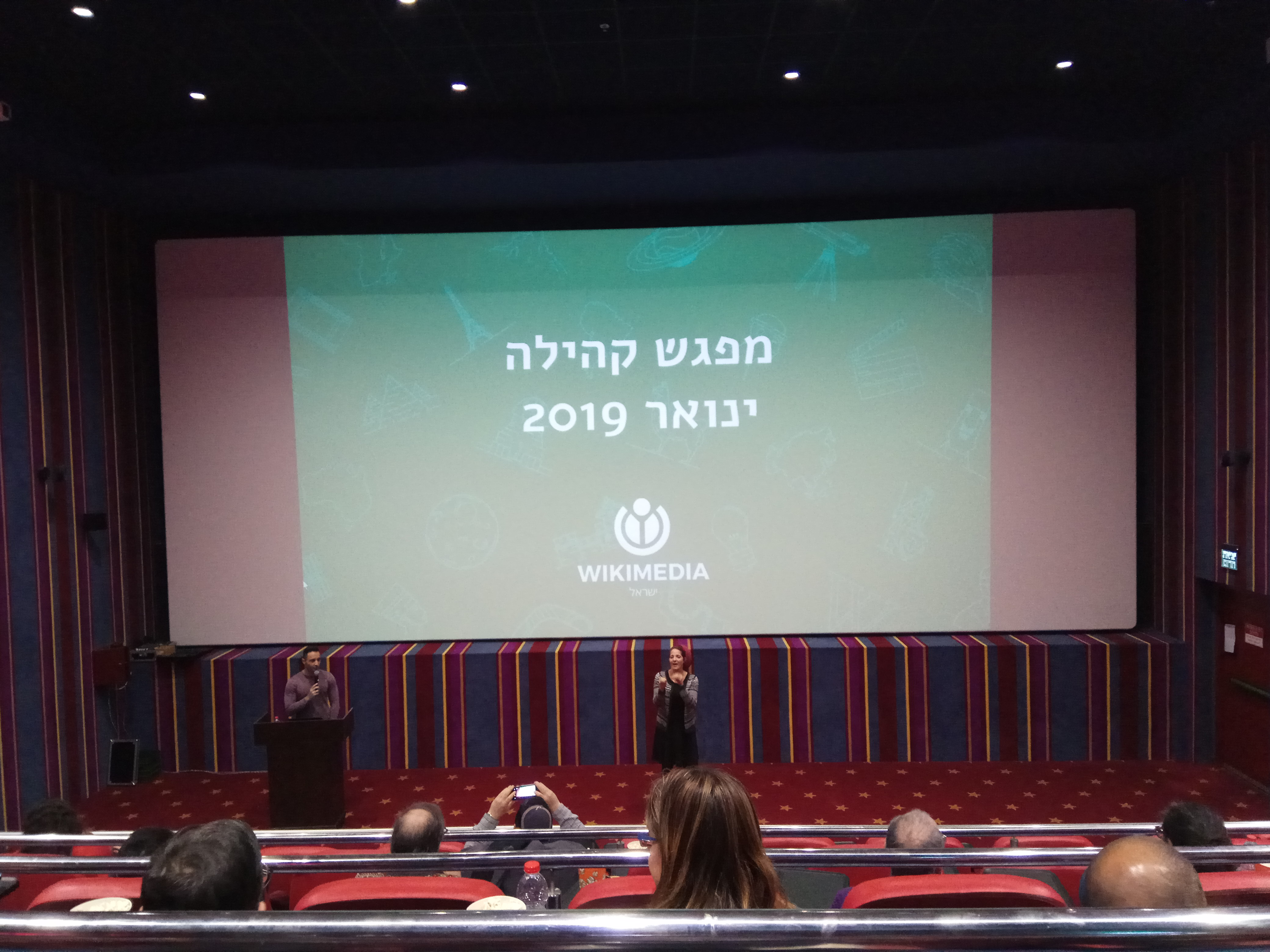 מפגש ויקימדיה בסינמה סיטי בירושלים